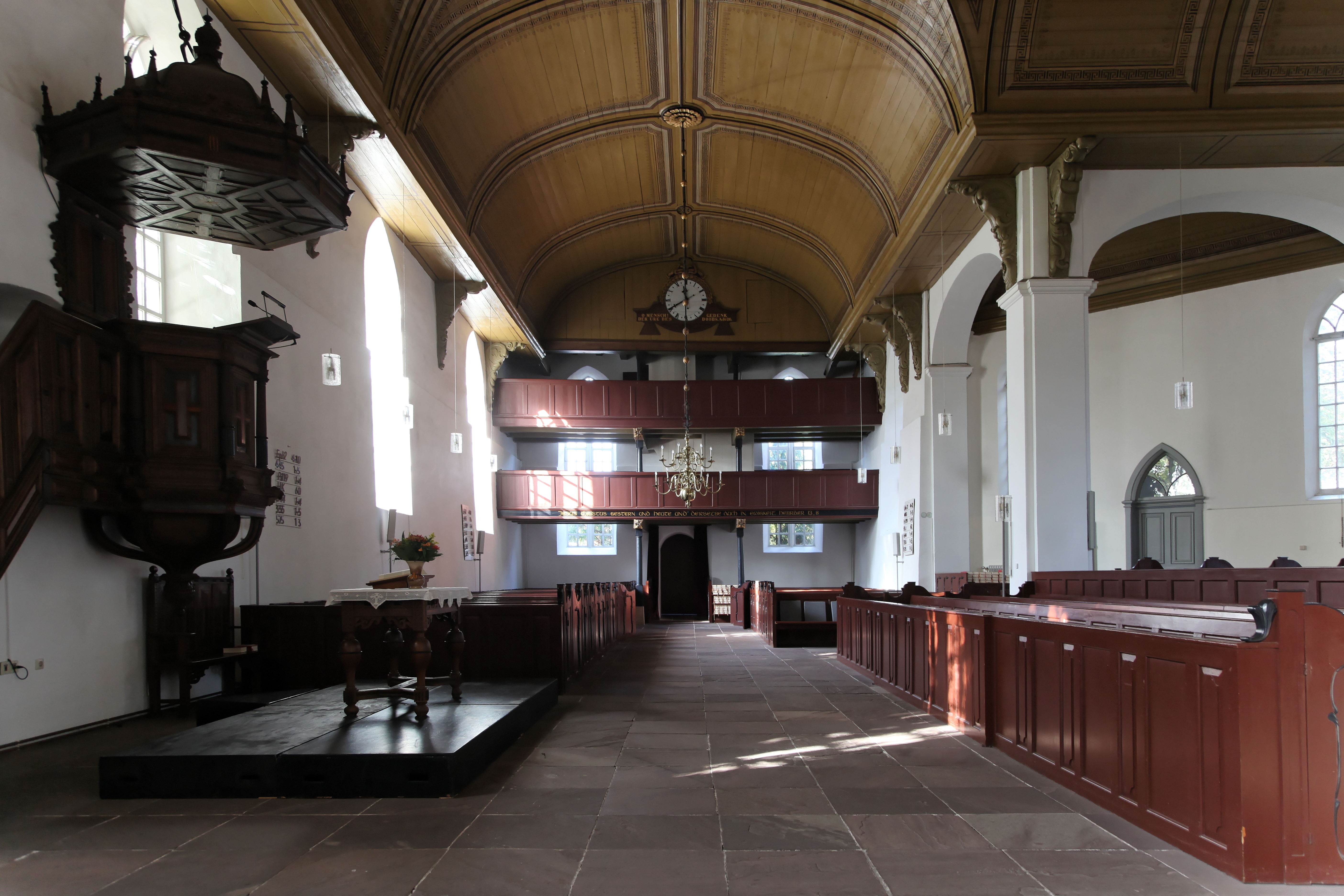 St.-Georgs-Kirche, Kirchplatz in Weener